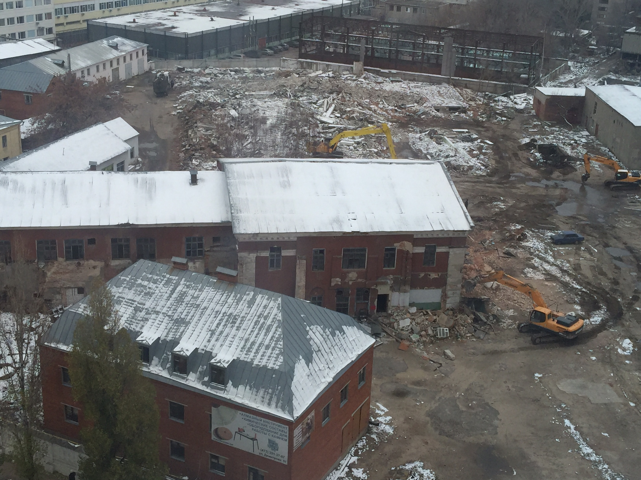 Церковь Рождества Христова на Придаче: улица Димитрова, 51, Воронеж, Воронежская область